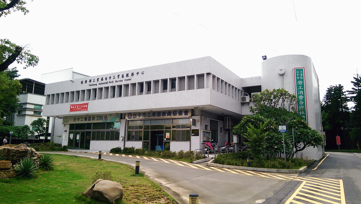 經濟部工業局臺中工業區服務中心，地址：臺中市西屯區工業區五路2號。